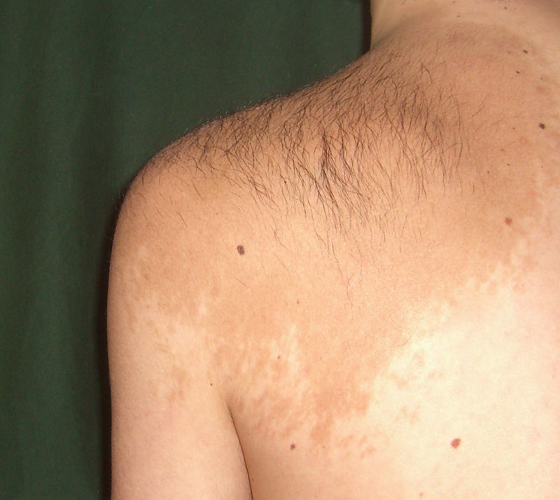 Becker's nevus / Becker-Naevus